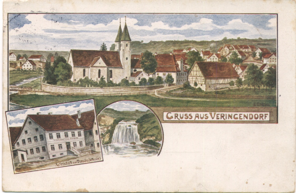 Veringendorf (heute Stadtteil von Veringenstadt, Schwäbische Alb), Postkarte von 1914, mit Ansicht des Dorfes (im Vordergrund die Kirche St. Michael), des Gasthauses Traube sowie des ehemaligen Wasserfalls Gieß